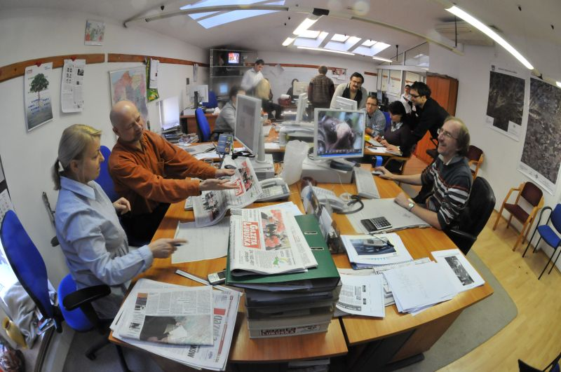 Newsroom Gazety Lubuskiej